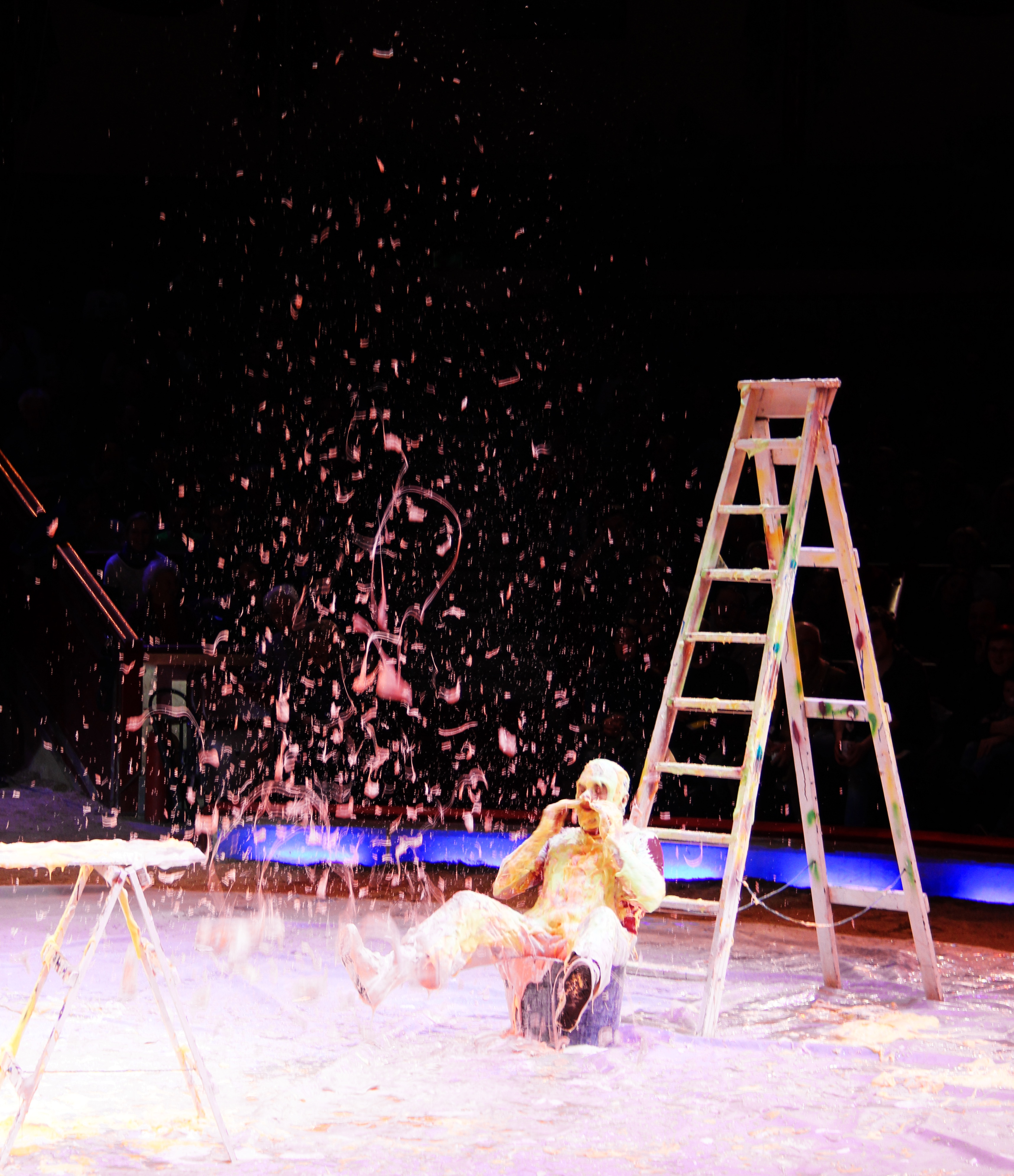 Vorstellung im Zirkus Krone. Cowns